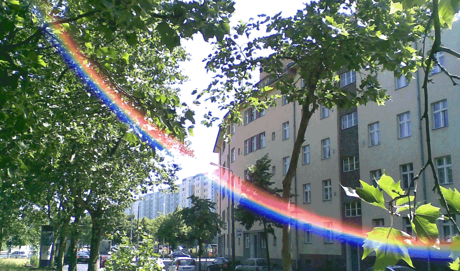 Die Bauten von 1928 diesseits und die von 1978 jenseits der Greifswalder Straße im Straßenzug des C-Ringes: Ostseestraße---Michelangelostraße